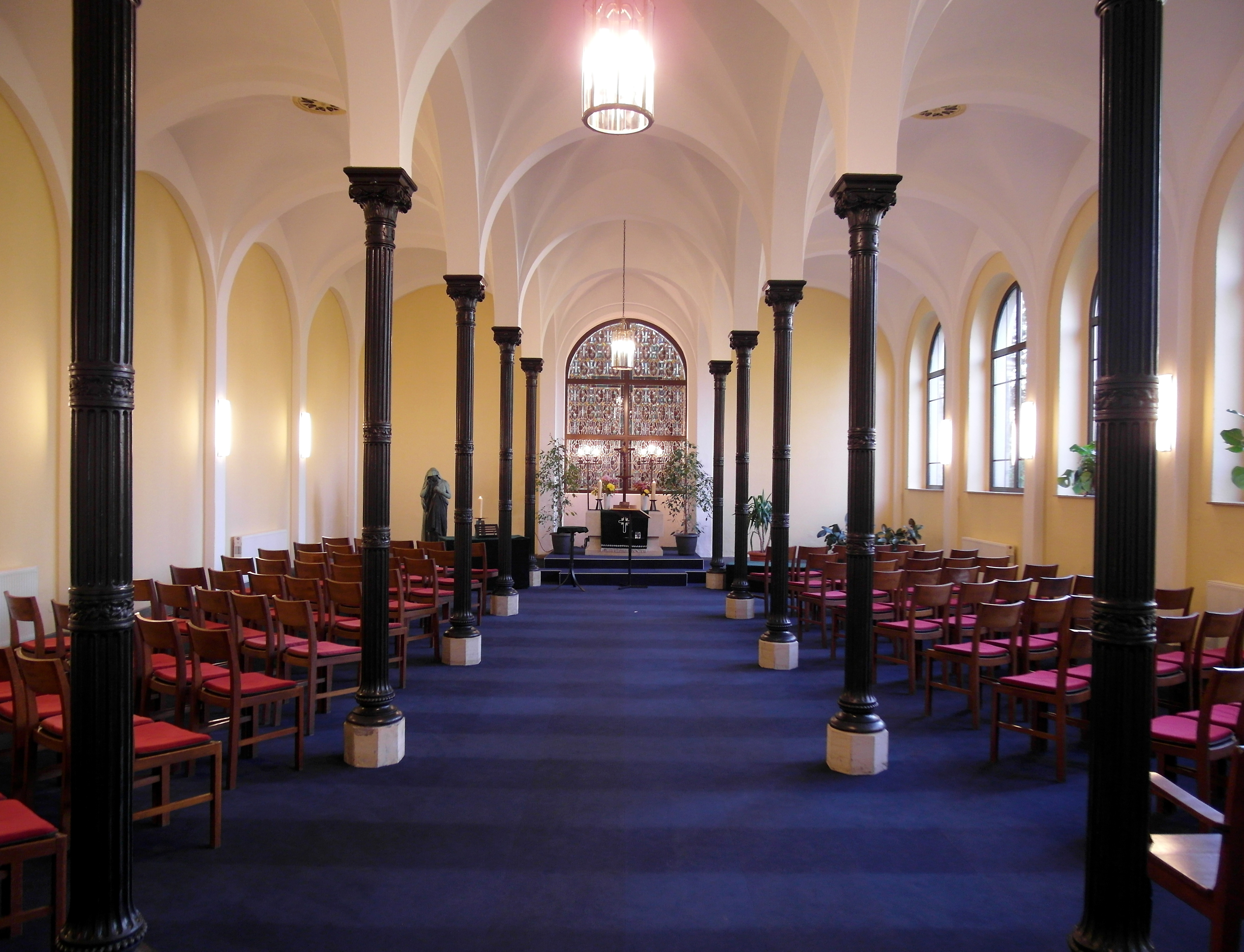 20.10.2017 01159 Dresden-Löbtau, Kesselsdorfer Str. 29: Neuer Annenfriedhof. Westliche Feierhalle am Ehrenhof (GMP: 51.042707,13.695672). Neorenaissance-Stil aus dem Jahre 1875 vom Semperschüler Robert Wimmer. [SAM2393.JPG]20171020105DR.JPG(c)Blobelt